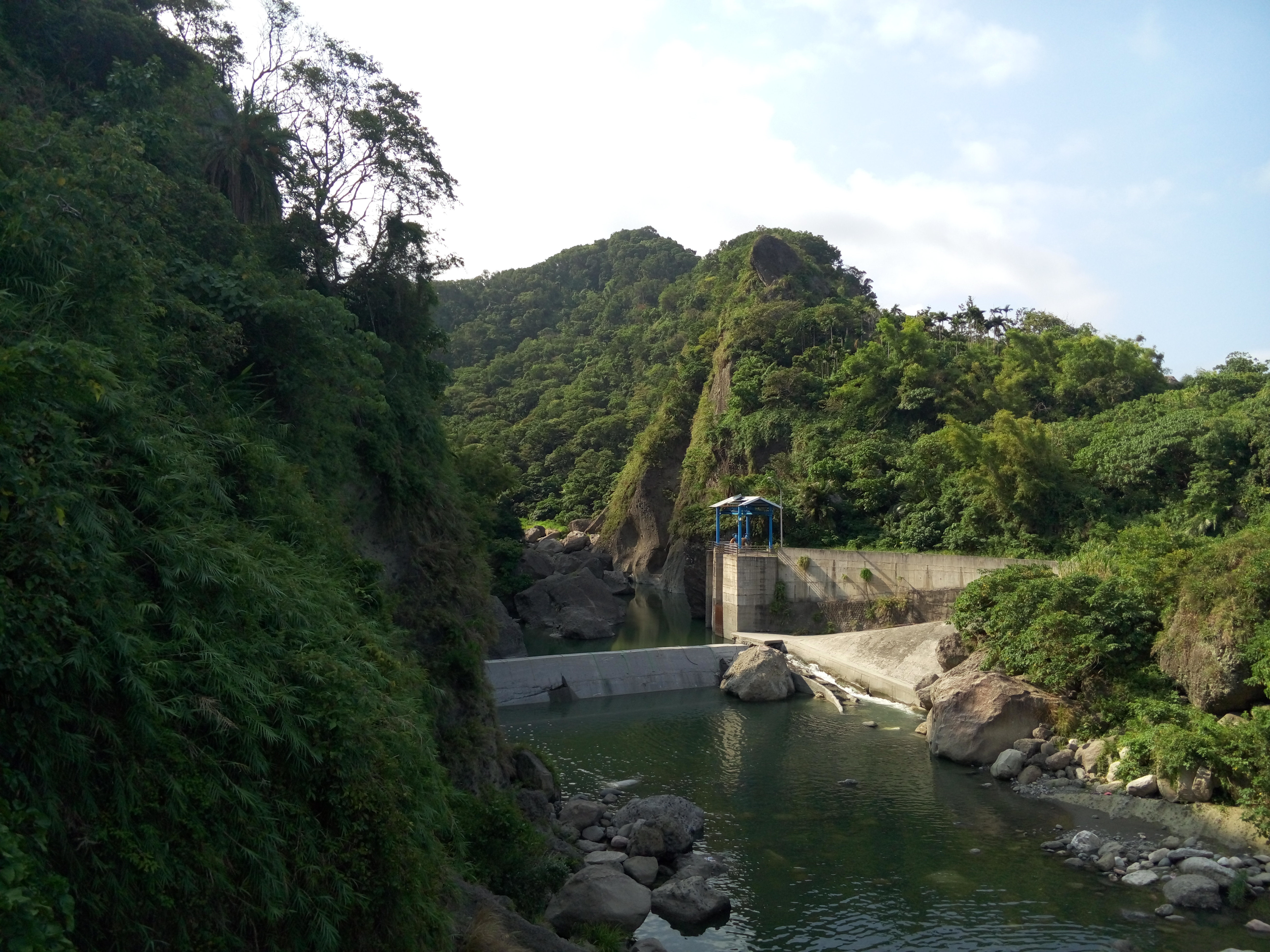 中文（台灣）: 臺灣臺東縣長濱鄉水母溪